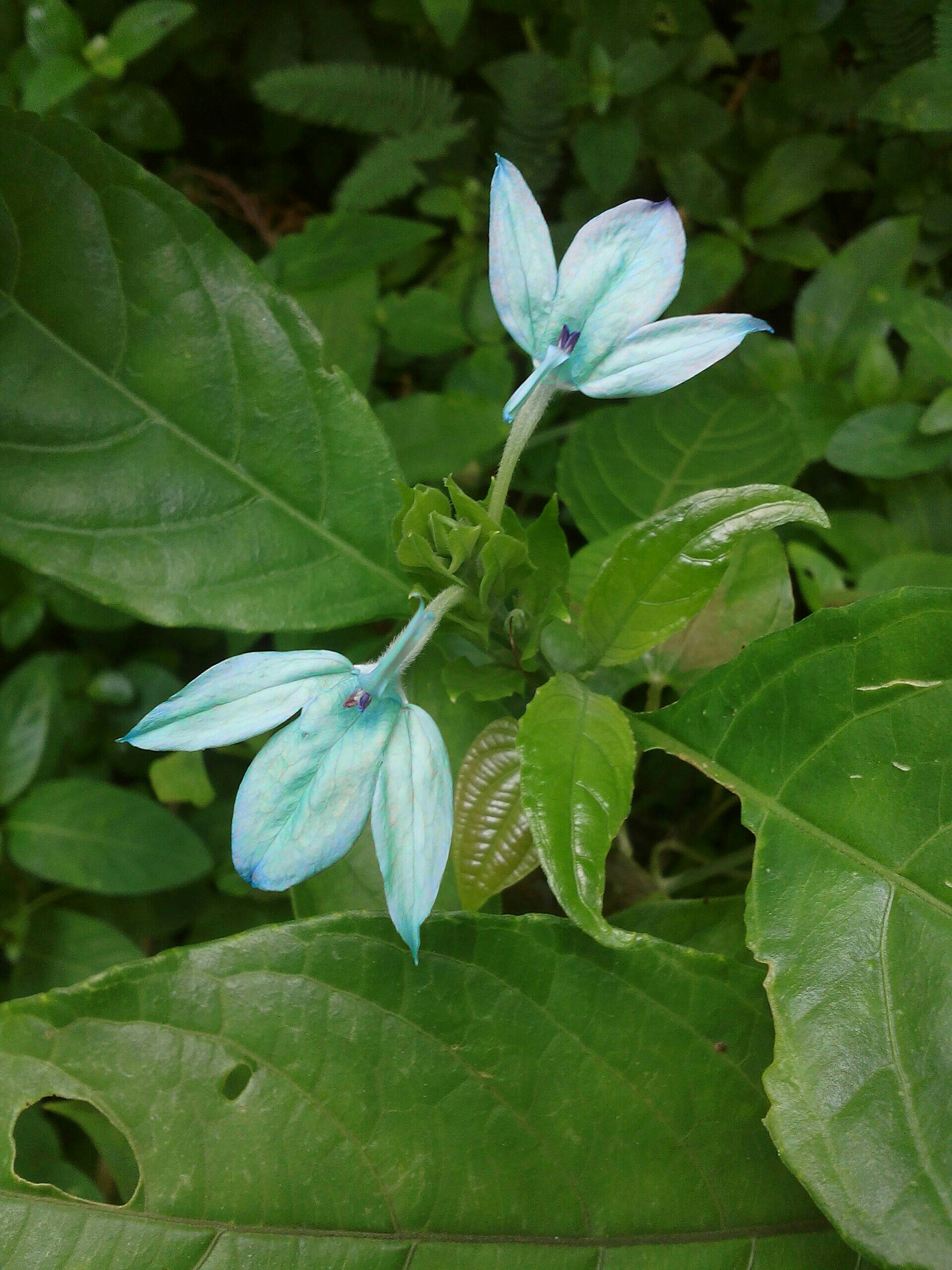 നീല കനകാംബരം, മലപ്പുറം ജില്ലയിലെ എ.ആർ.നഗറിൽ നിന്നും